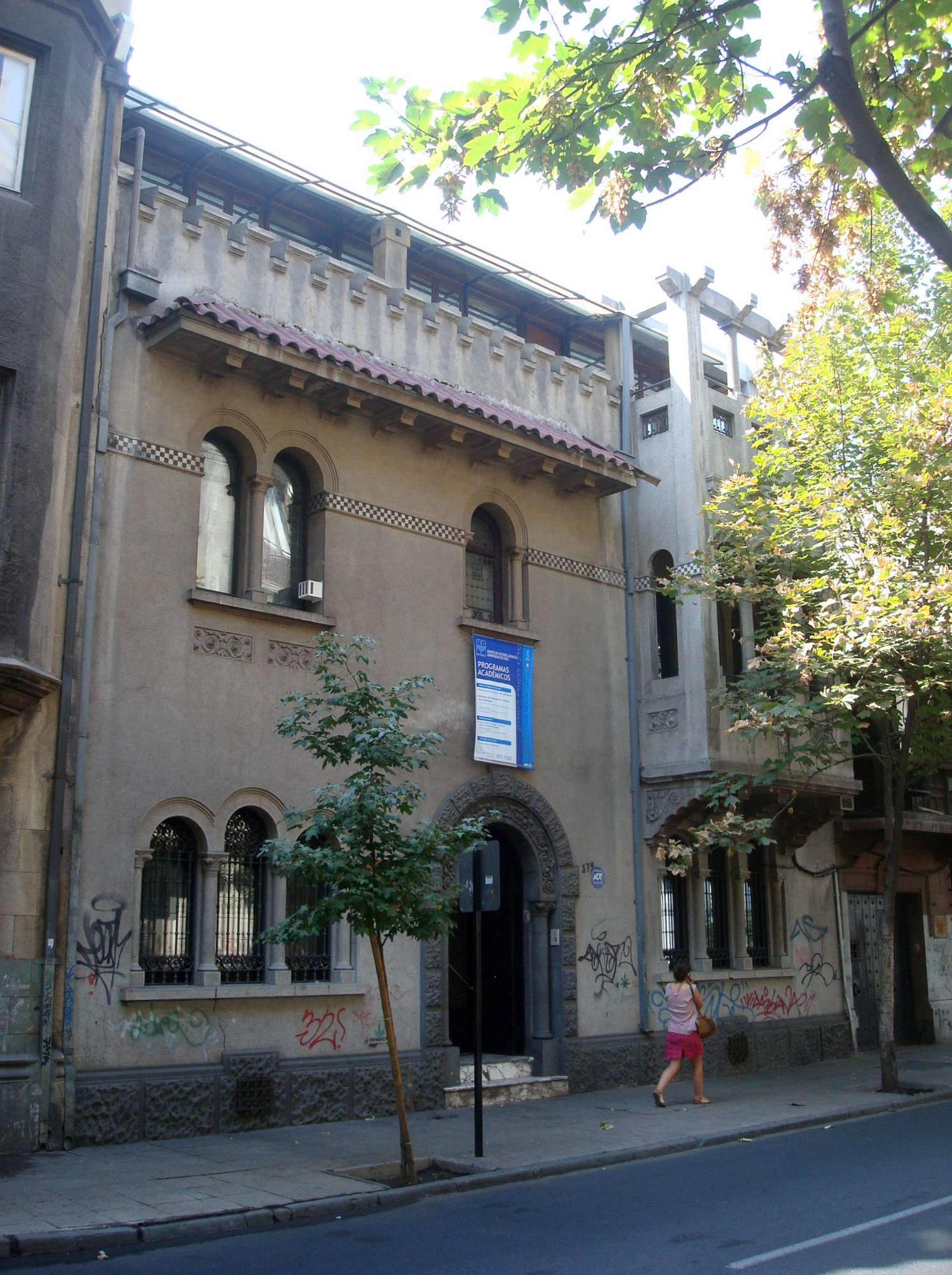 Centro de Estudios Judaicos de la Universidad de Chile, Santiago Centro, Chile